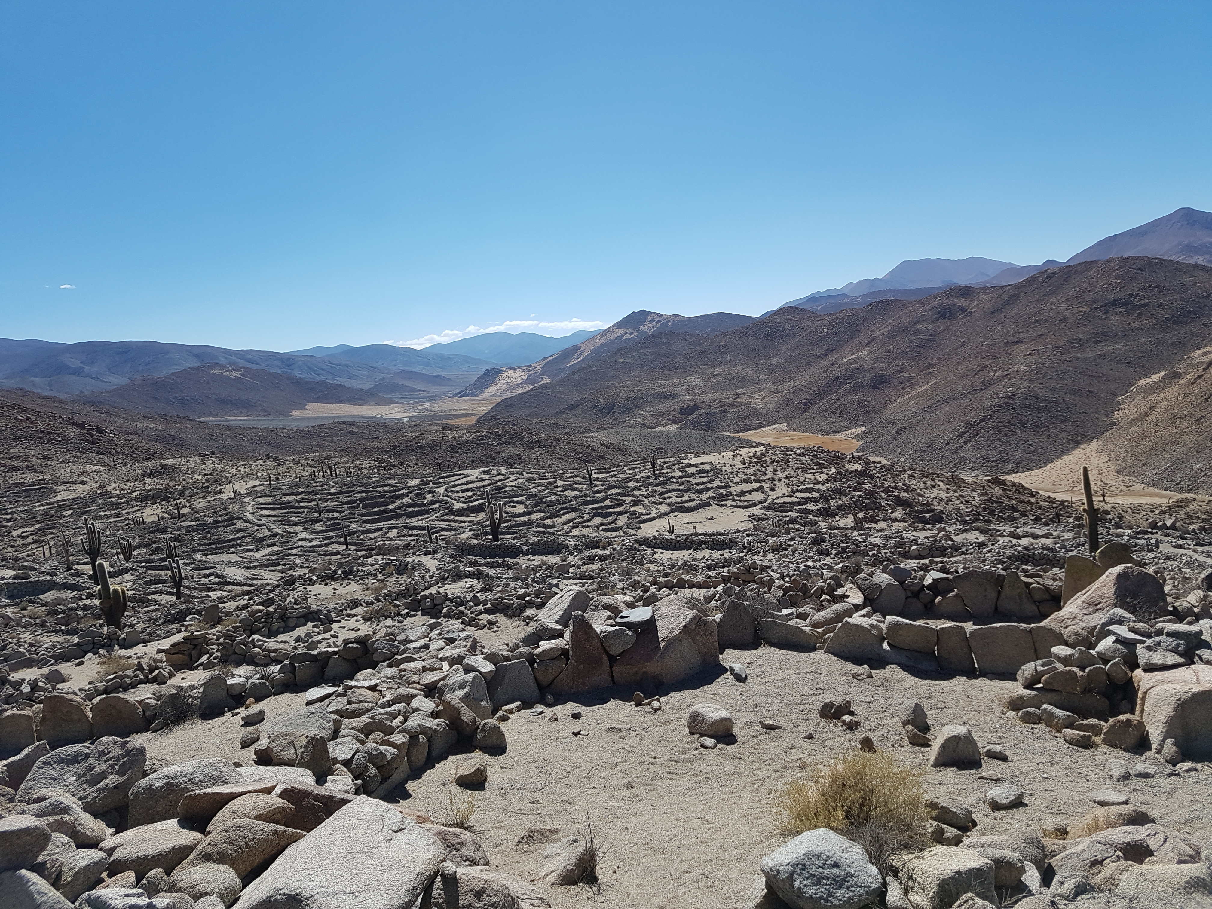 monumento cultural. lugares